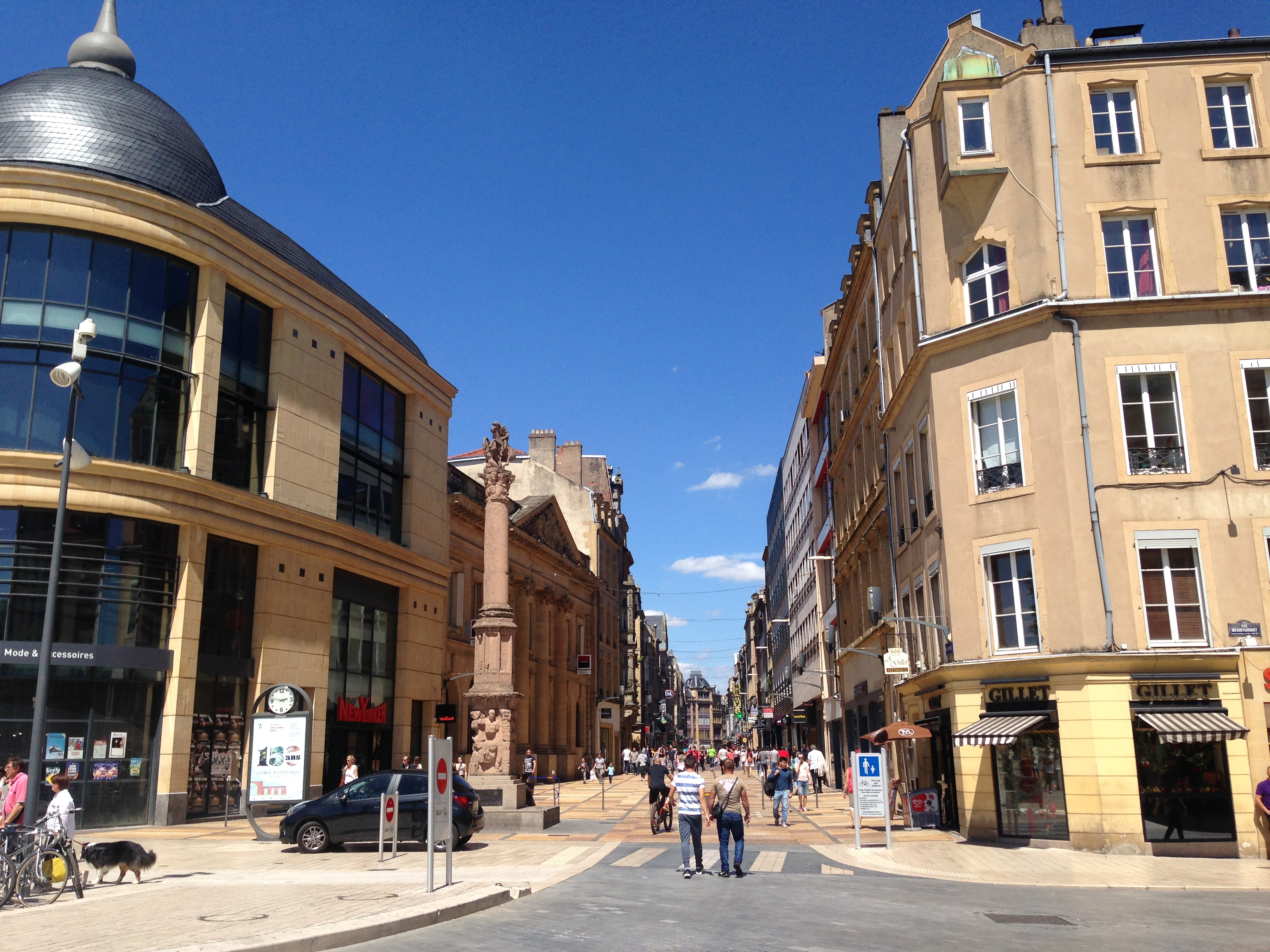 centre ville de Metz